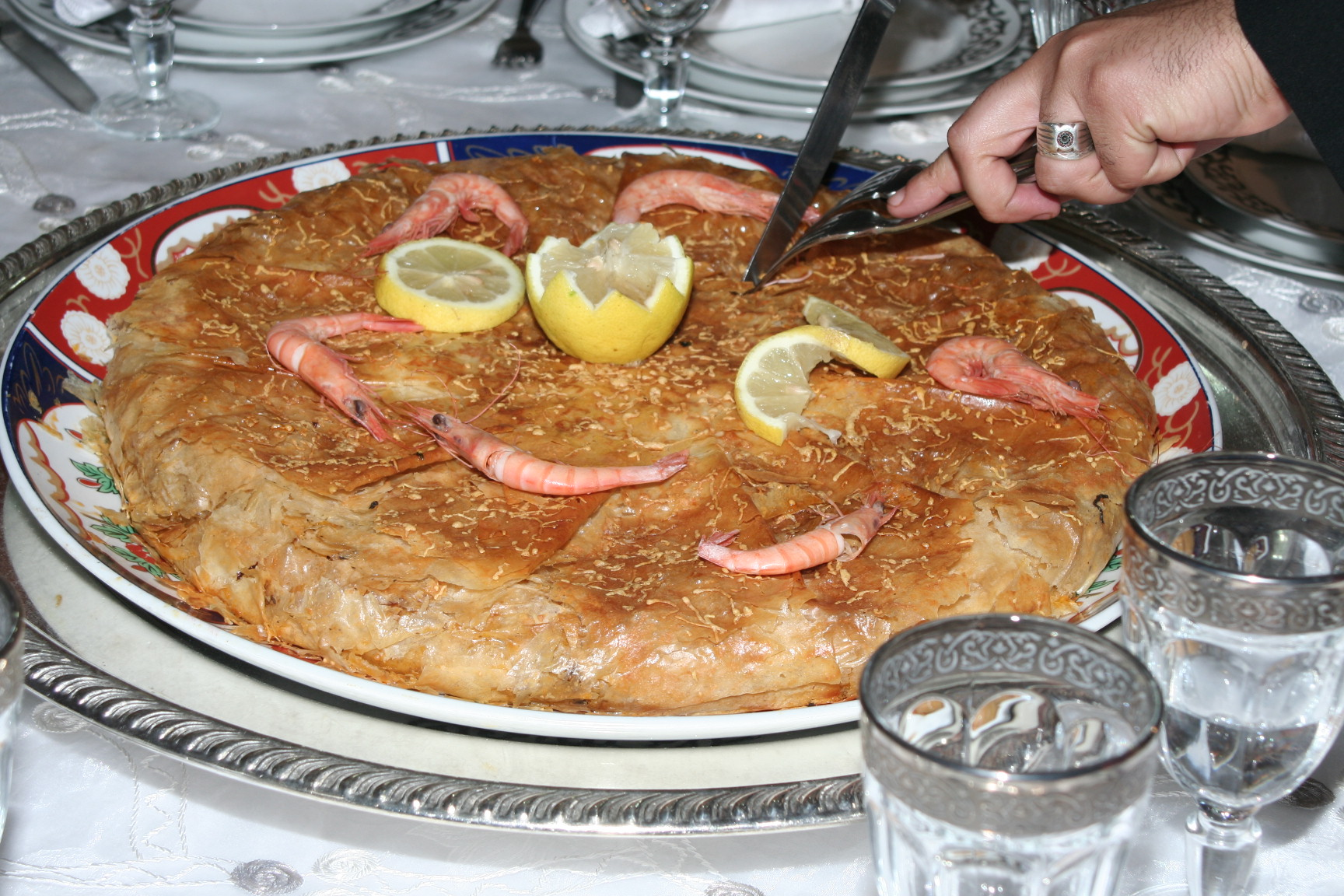 Walon: pastiya avou des gurnåtes dissu